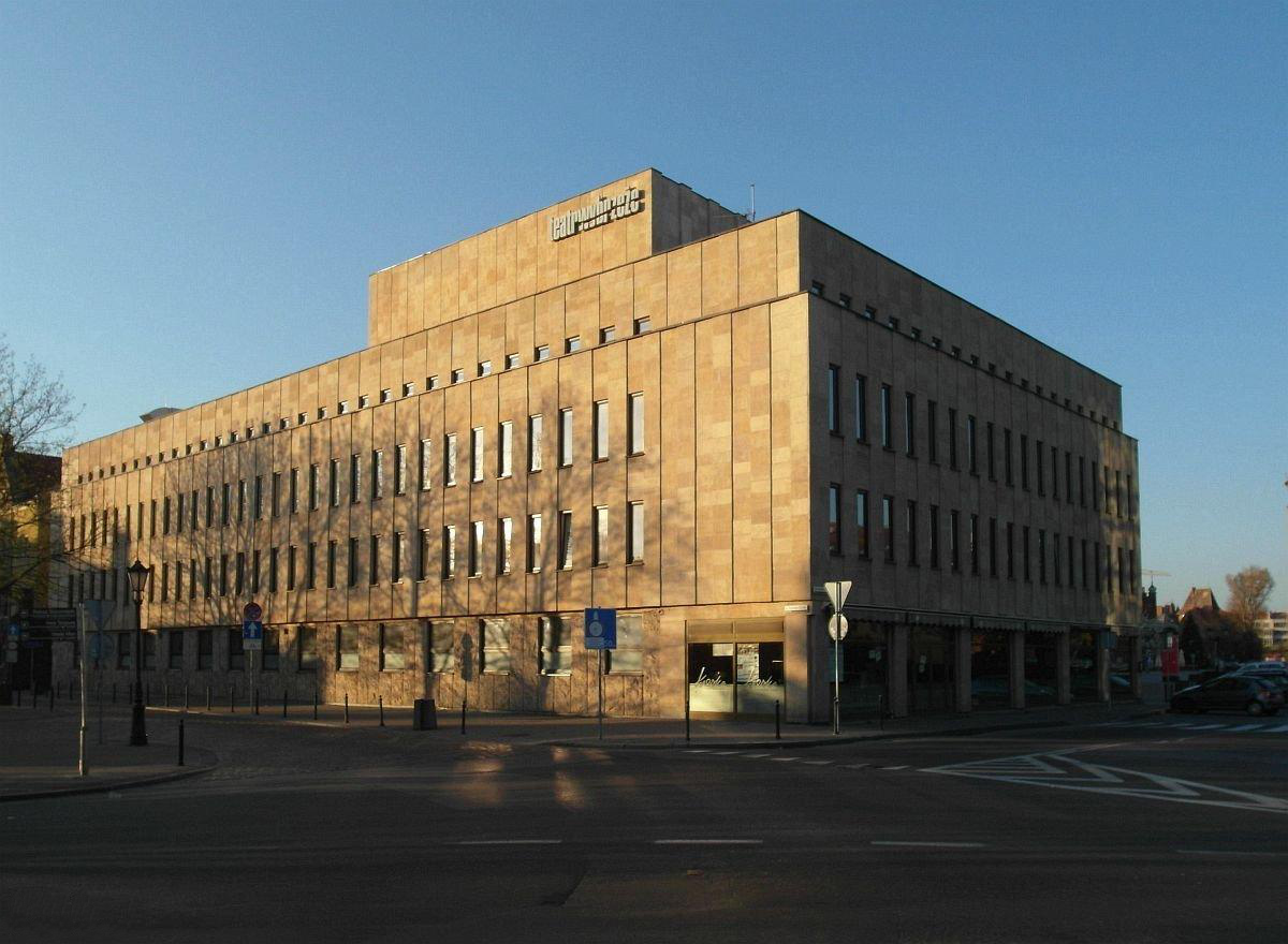 Spojrzenie na bryłę Teatru, od strony Targu Drzewnego. W prawo Targ Węglowy, w lewo Św. Ducha.